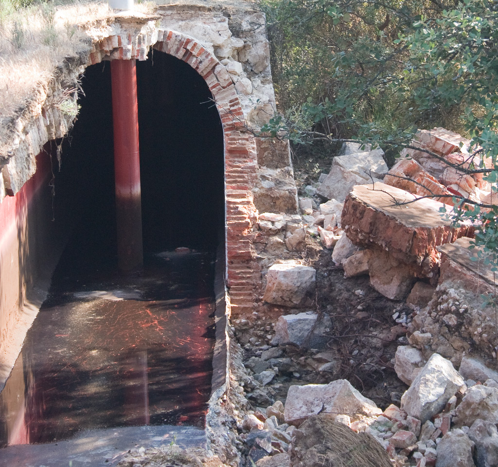 Rotura en canal Bajo que muestra su estructura